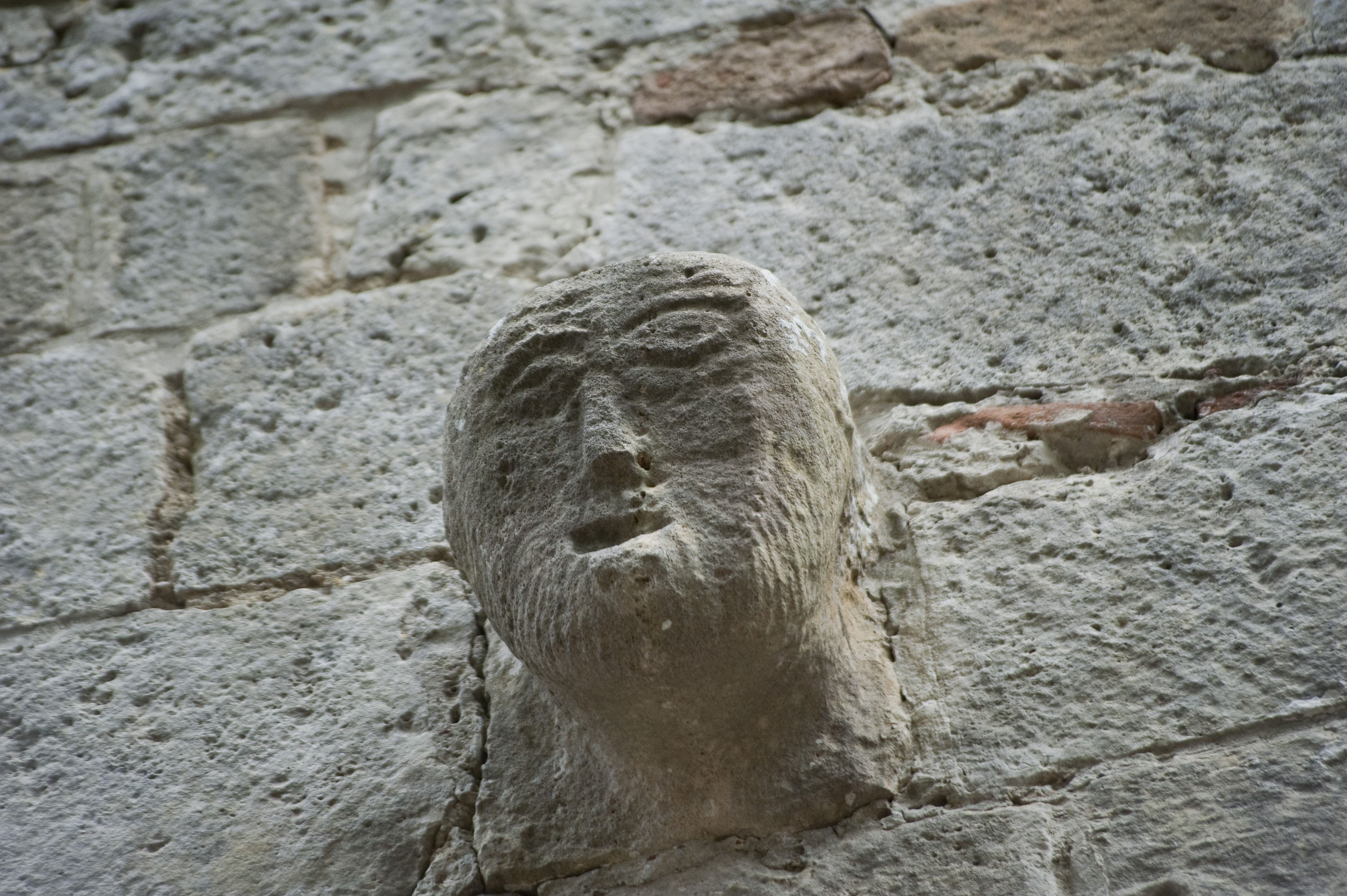 Testa scolpita nella facciata della Pieve di Santa Maria Assunta a Cellole - San Gimignano